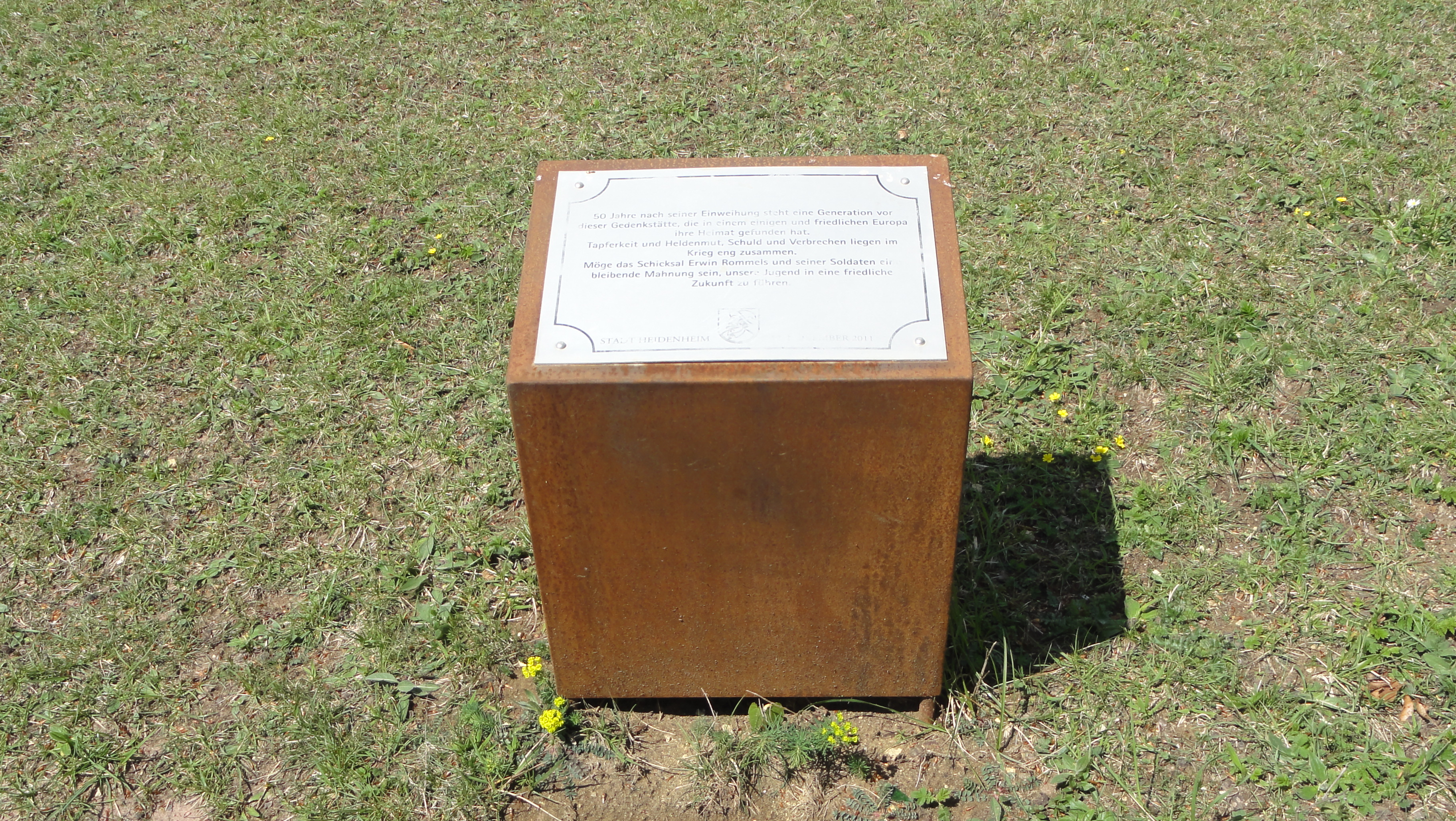 Dies ist die im Jahre 2011 zusätzlich aufgestellte Informationstafel.